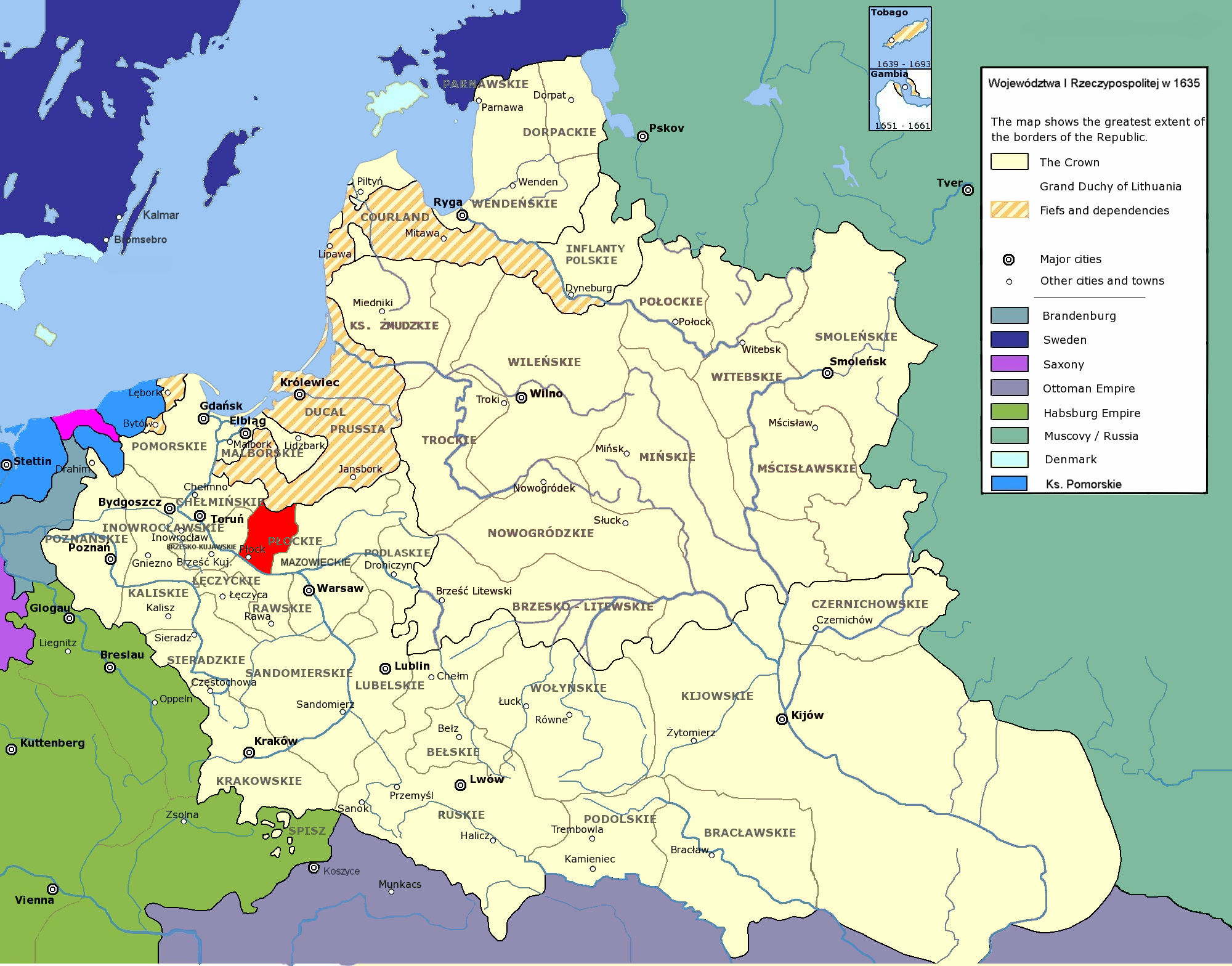 Rzeczpospolita Obojga Narodów w 1635 r.; województwo płockie Polish-Lithuanian Commonwealth in 1635; Płock Voivodeship